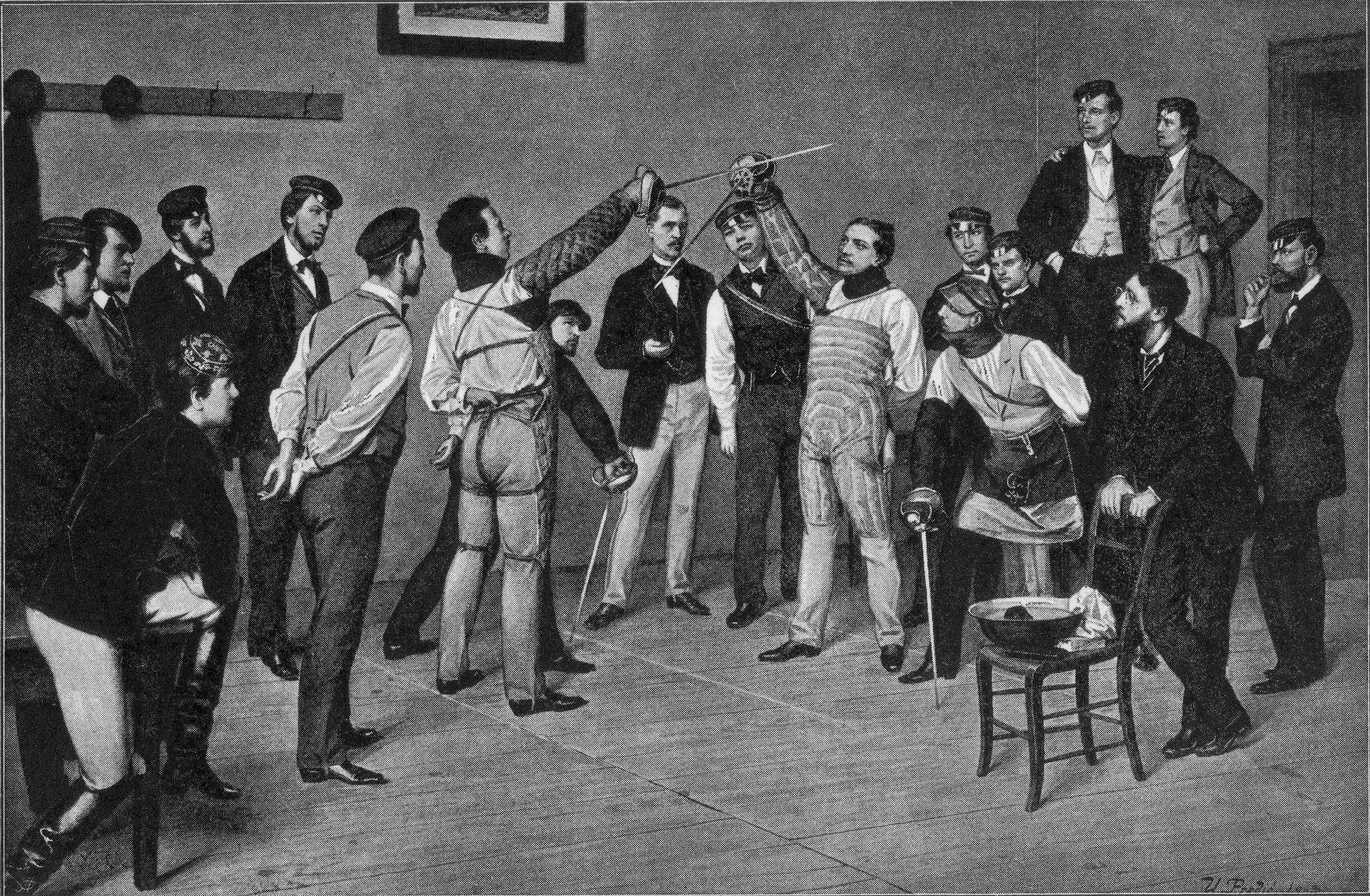 Fotographie eines Gemäldes. Das Bild zeigt die PP Corps Saxonia Wien c/a Burschenschaft Silesia Wien am 8. März 1869 im Lokal "Hirsch" in Dornbach bei Wien. Unparteiischer: Ludwig Roth, Paukarzt: Dr. von Pfleger. Das Gemälde ist von Urosch Predic. Dargestellt ist die Partie Milan Savic (Saxonia, rechts) c/a Karl Körbl (Silesia, links). Die Beschreibung hier ist nach Milan Savic, Blau-rot-gold, Wien 1903, Seite 77.